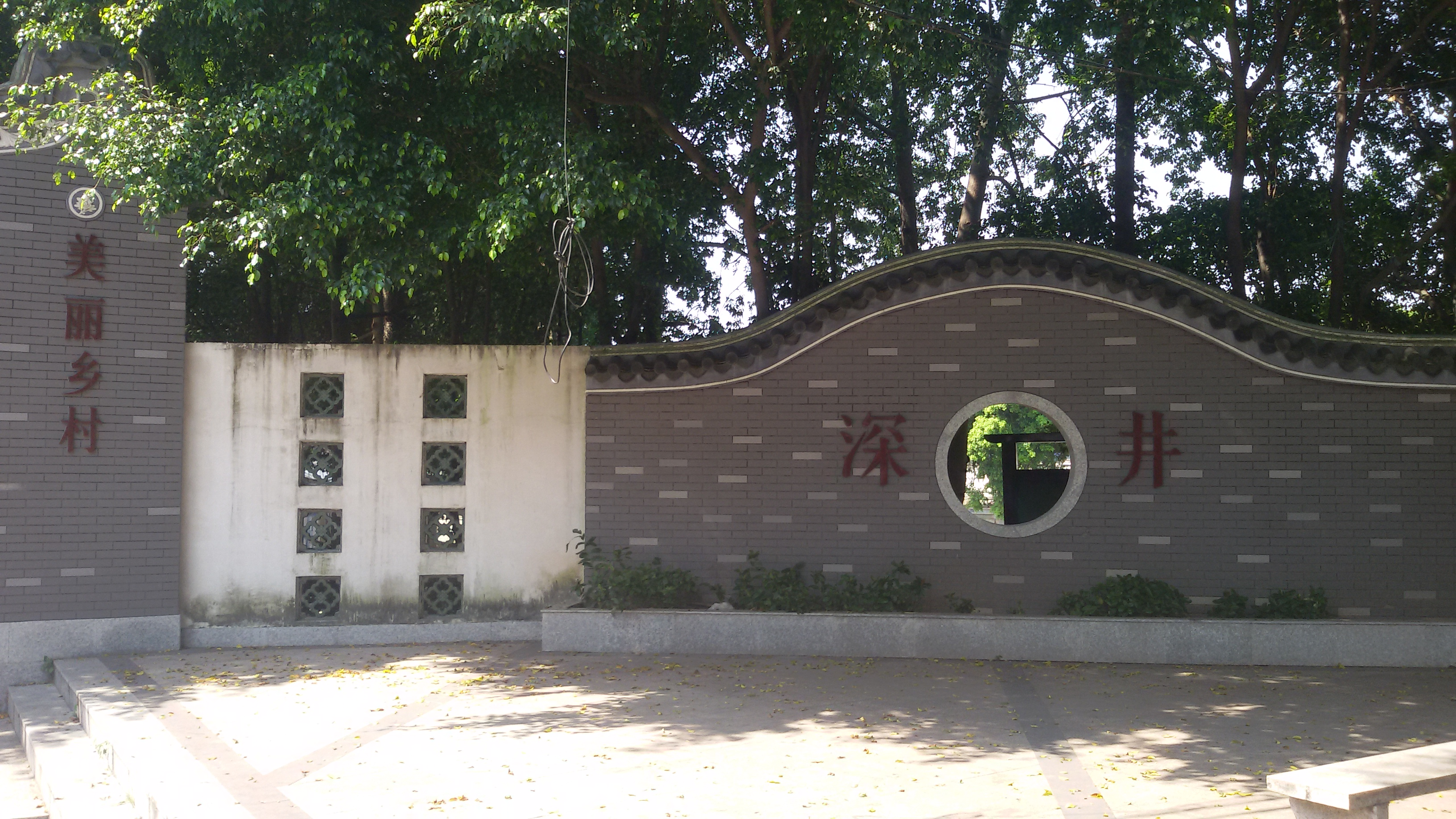 粵語: 深井村嘅牌坊